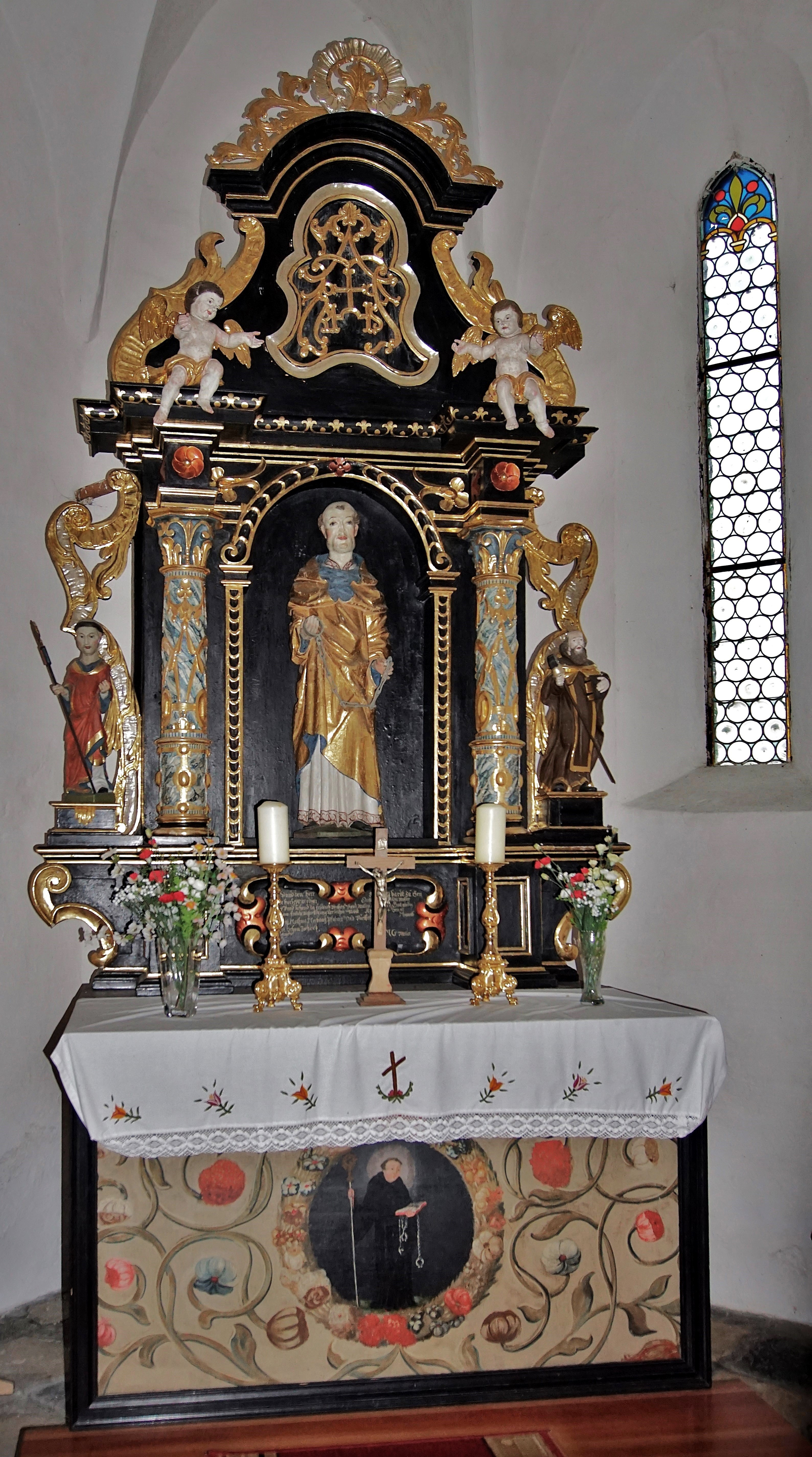 Barocker Altar der kath. Filialkirche St. Leonhard in St. Leonhard, Liebenfels